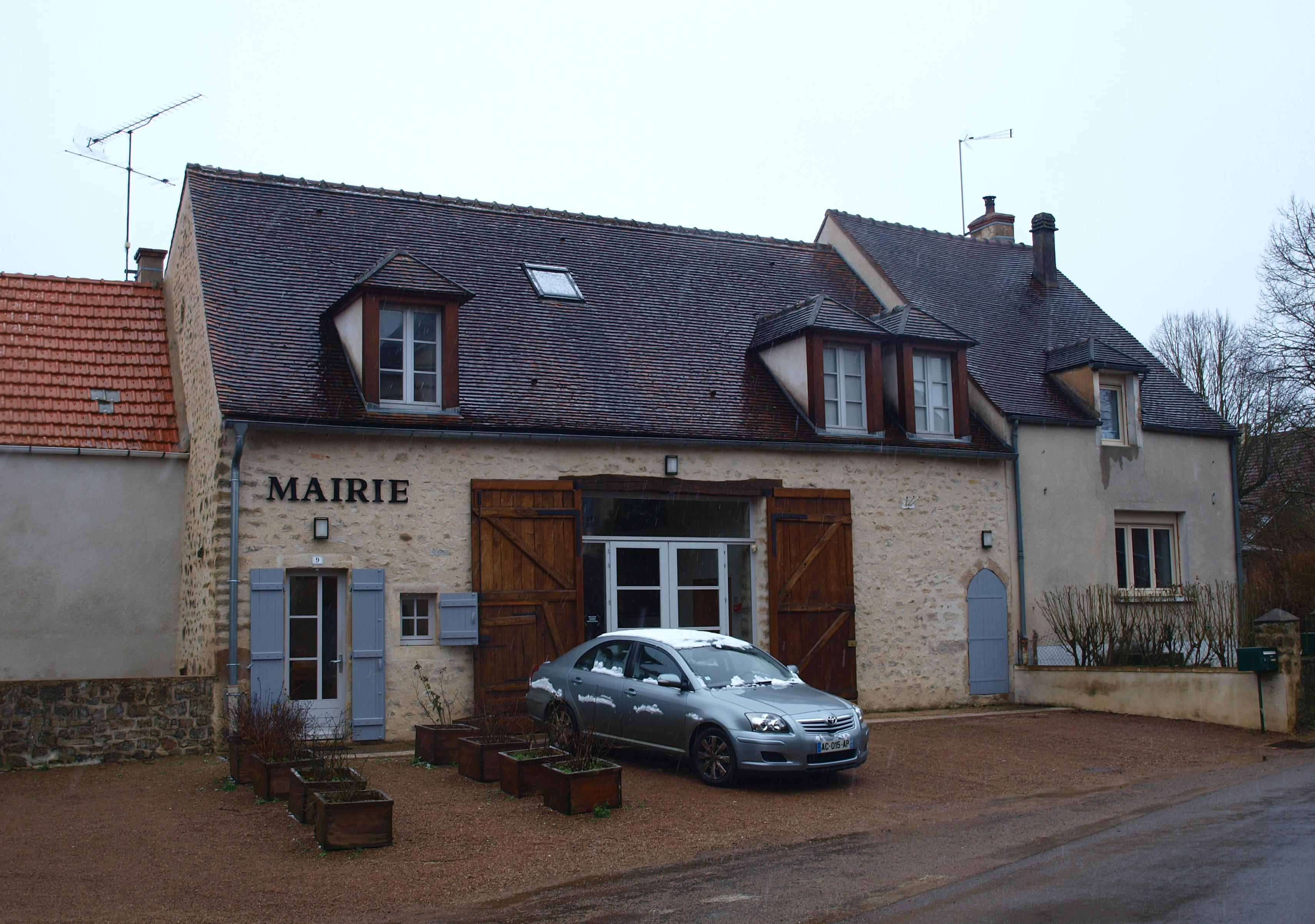 Island (Yonne, France) ; mairie.